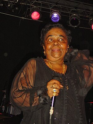 Cesária Évora em San Diego, Califórnia, EUA